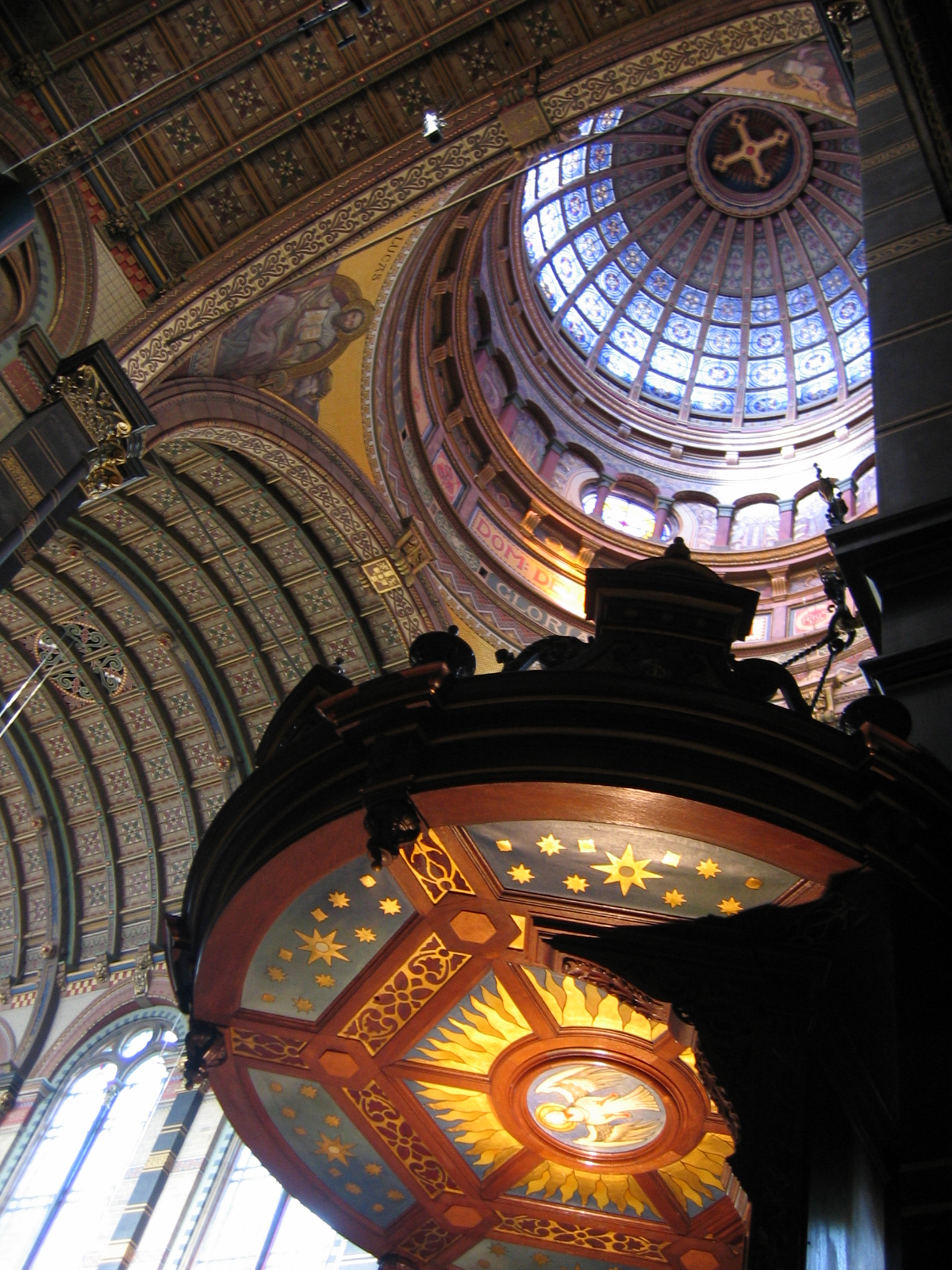 De Sint Nicolaaskerk is de derde Amsterdamse kerk op rij die werd gewijd aan de patroonheilige van de stad. Sint Nicolaas was schutsheilige van de zeevaarders en werd daarom ook vaak als patroonheilige van havensteden gekozen. Het ontwerp van de kerk is van architect A.C. Bleys; de plechtige wijding volgde op 7 februari 1887. Als rooms-katholieke hoofdkerk van Amsterdam moest het gebouw een bijzondere allure uitstralen. Bleys gaf de kerk een neobarok uiterlijk met twee torens en hoge koepel als blikvangers. De Nicolaaskerk is gebouwd als driebeukige kruisbasiliek met Korinthische zuilen. Ook het interieur doet barok aan en is voor Nederlandse maatstaven ongewoon rijk. Het hoogaltaar is uitgevoerd in verschil- lende kostbare marmersoorten en voorzien van beeld- houwwerk en bronzen reliëfs. De schilderingen in het interieur zijn het werk van J. Dunselman, die er met onderbrekingen dertig jaar aan heeft gewerkt. In 1997-2000 werd de kerk gerestaureerd.